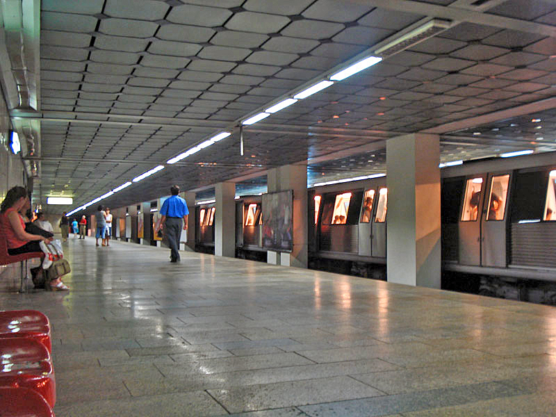 Quai et desserte de la station.